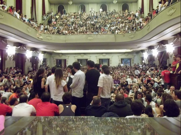 Alunos da USP reunidos em Assembleia na Faculdade de Direito após protesto no Centro de São Paulo votam greve.